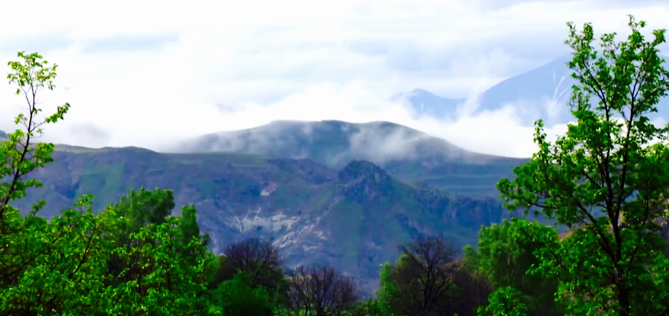 Culfa dağları